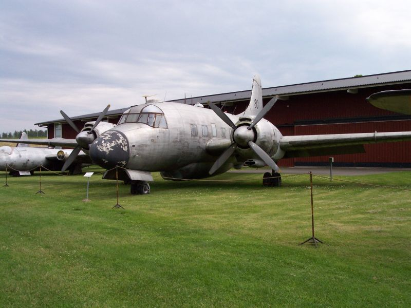 Vickers Versity